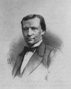 Conrad Busken Huet, van het project Laurens Janszoon Coster, afbeelding staat op deze subpagina van LJC auteursrechtensituatie: "Ook al onze afbeeldingen zijn voor zover ons bekend auteursrechtenvrij." zie 16 dec 2004 02:29 Cicero 236x293 (10798 bytes) (Conrad Busken Huet, van het project Laurens Janszoon Coster, PD )